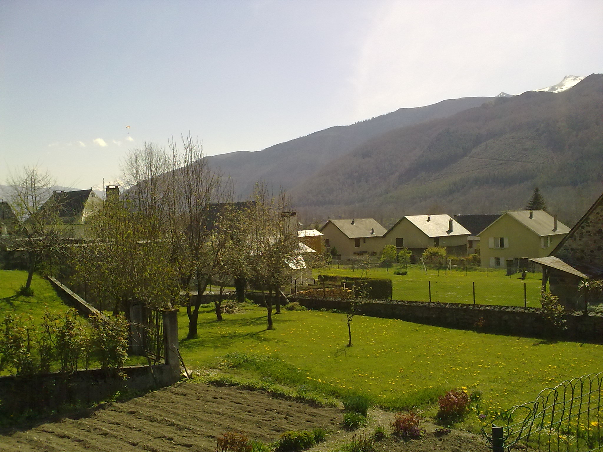 Paysage depuis Aucun, France.